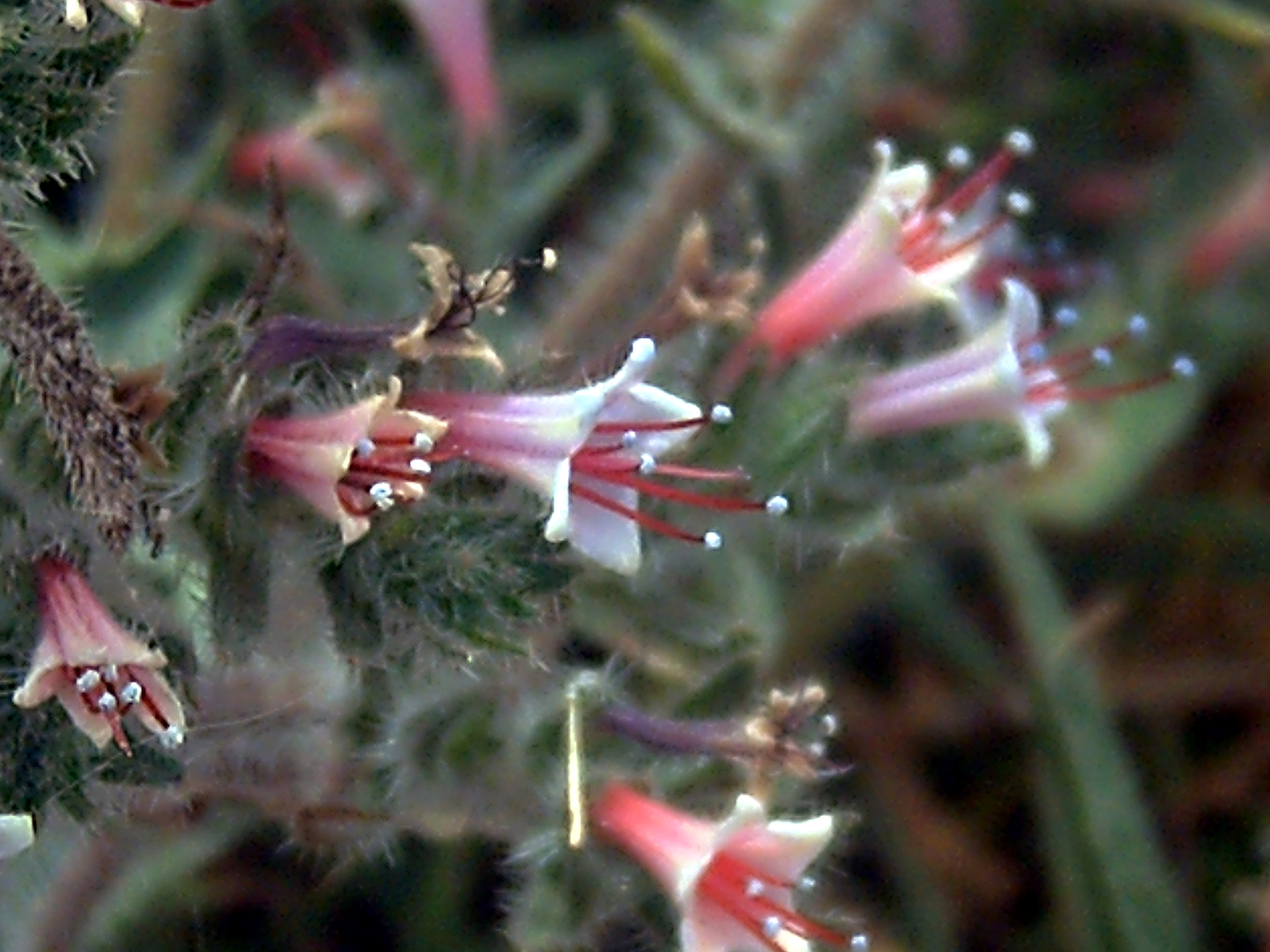 Echium_asperrimum Closeup, Cañada de Calatrava, Spain